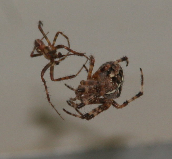 Kreuzspinne vor der Paarung